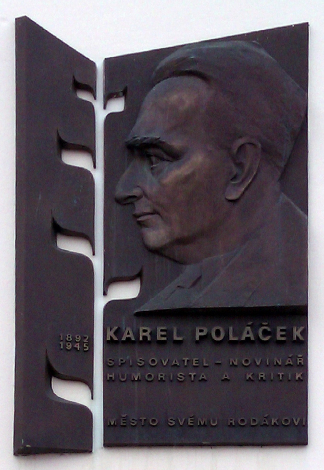 Pamětní plaketa na památku Karla Poláčka